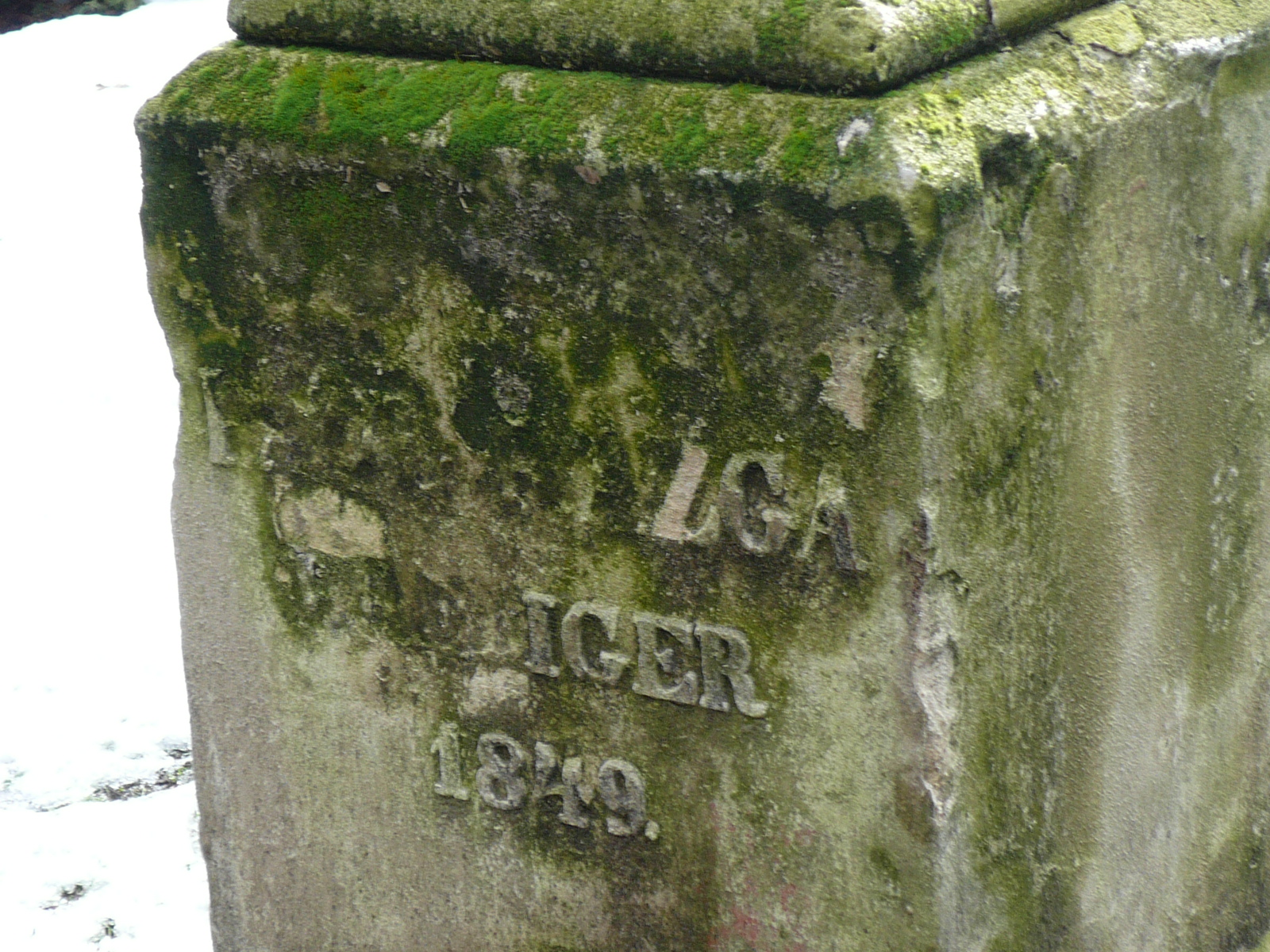 Erstellt am Gaistor-Friedhof zu Preßburg von Anton Klipp, Wiesbaden